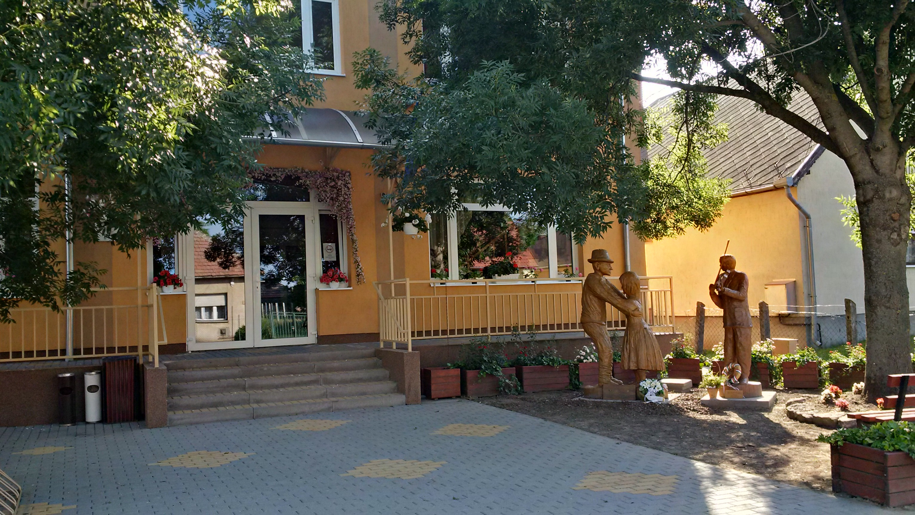 Fa-szobrok